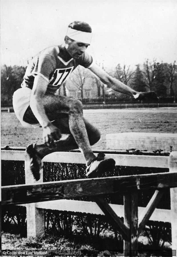 Ould Lamine Abdallah (born 1929) is a French former long-distance runner who competed in the 1952 Summer Olympics.